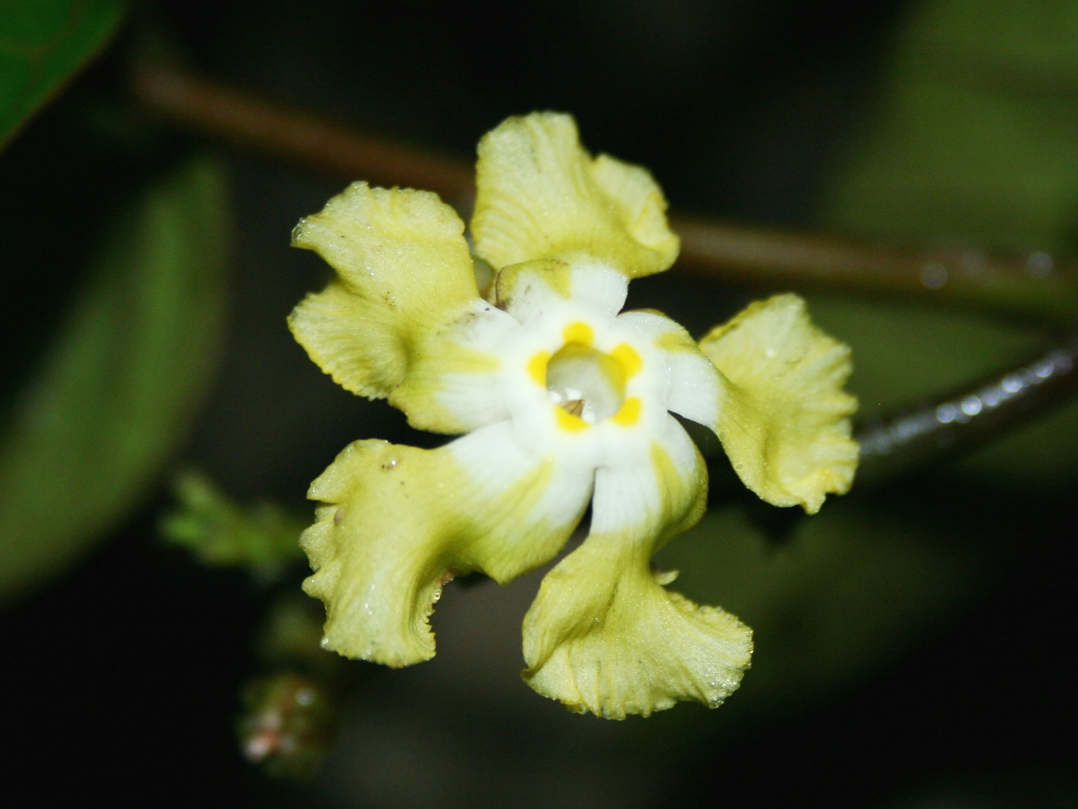 Květ Mandevilla javitensis, Rio Ventuari, Venezuela